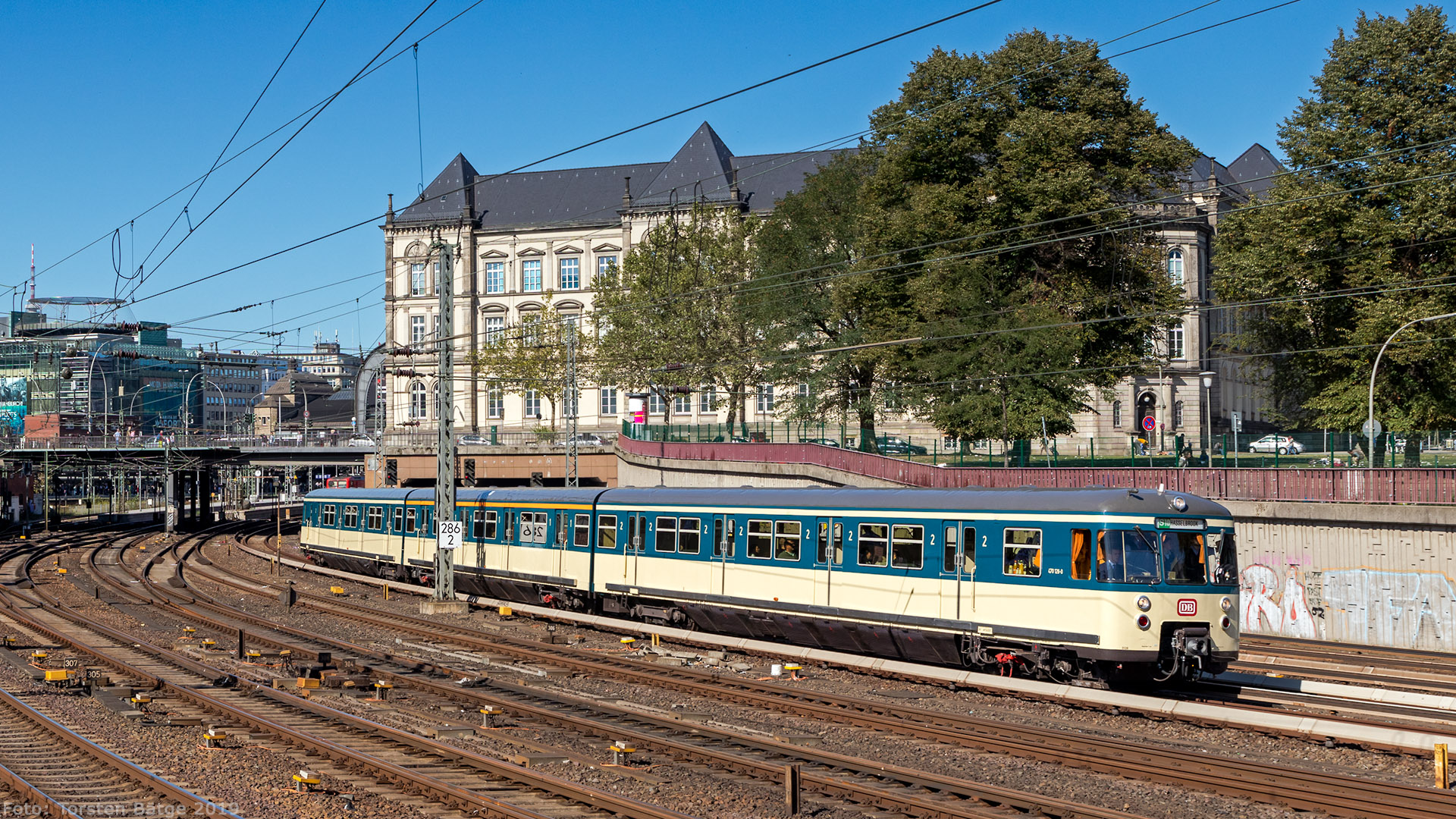 470 128-0 (Baureihe ET/EM 170, Waggonfabrik J. Rathgeber AG Nr. 20306/4, Bj. 1969) fährt auf Gleis 4 aus dem Hamburger Hauptbahnhof ab. Während des Verkehrshistorischen Tages 2019 pendelte die historische S-Bahn zwischen Hamburg-Altona und Hasselbrook.